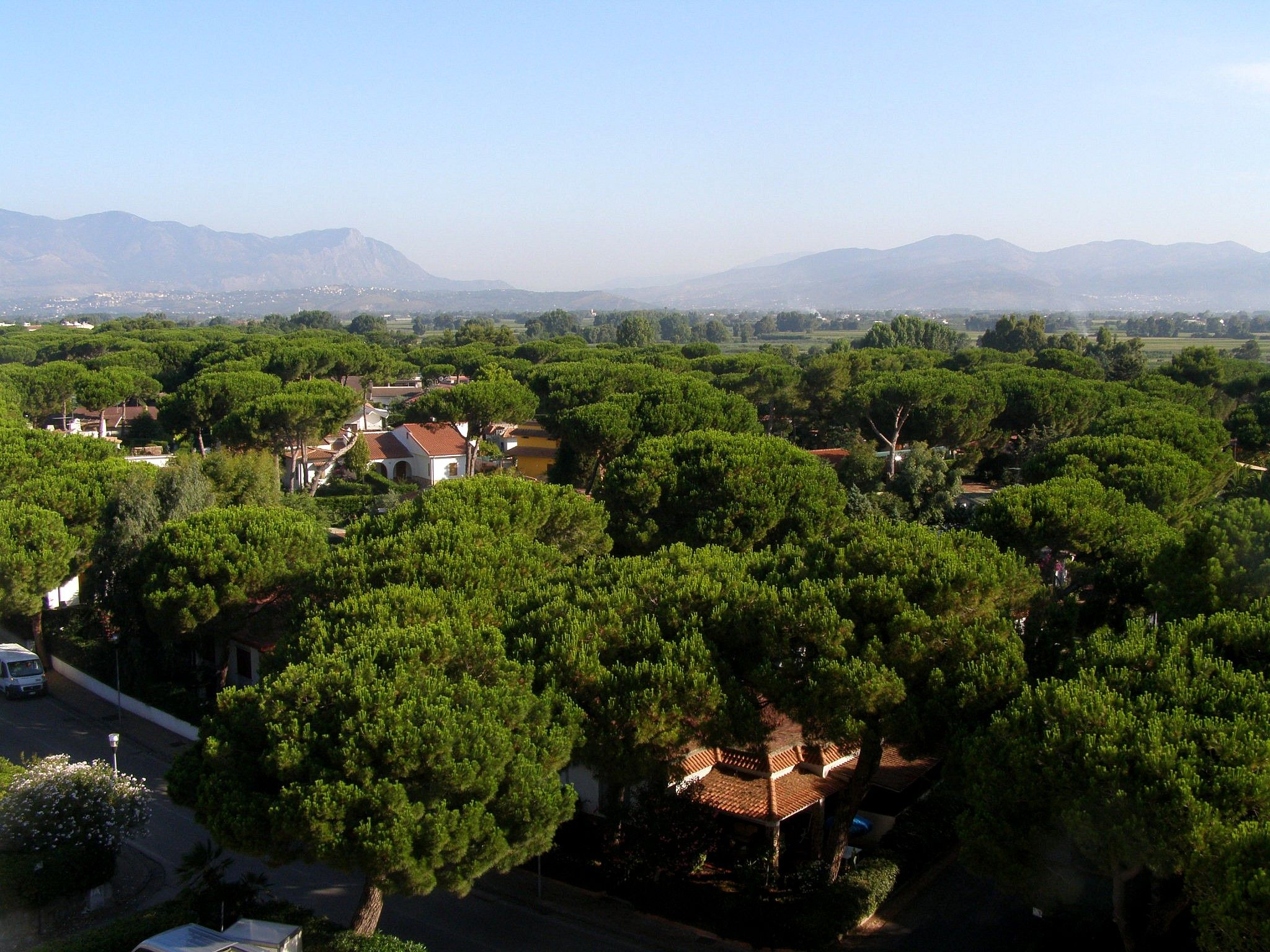 Budovy v Baia Domizia sa "topia" v záplave vysokých borovíc